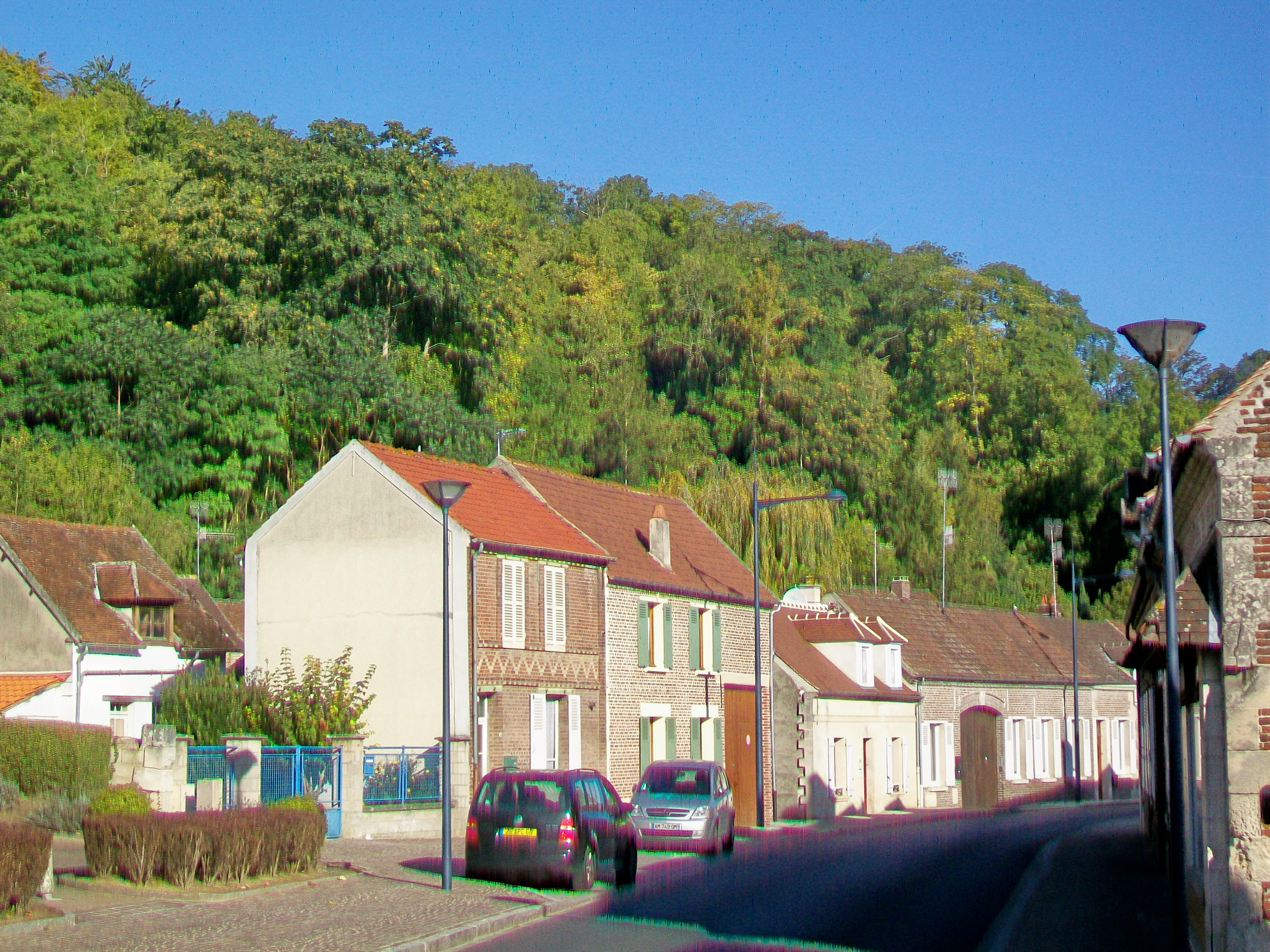 Rue de la République (RD 13).